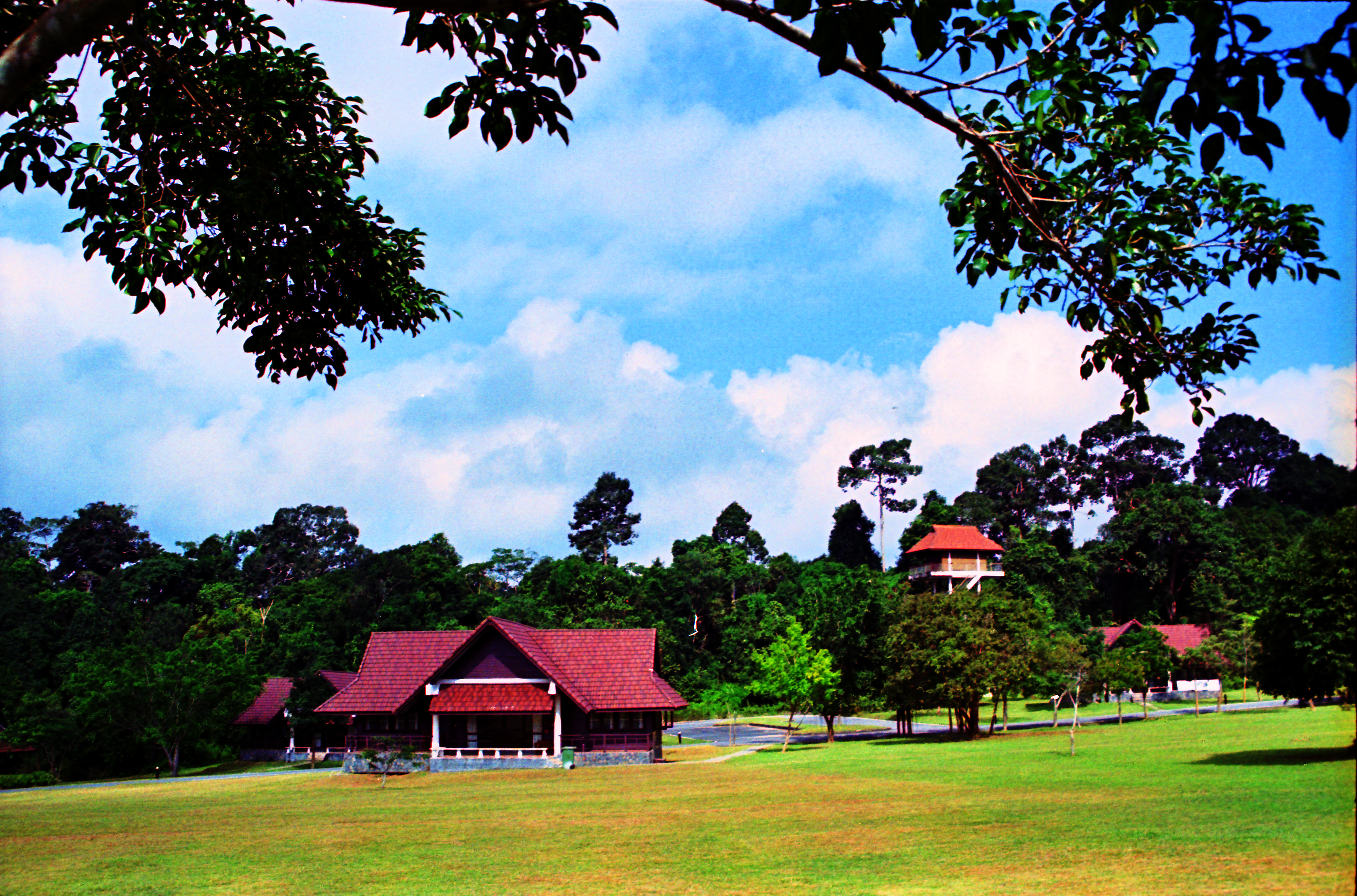 บ้านพักโซนธนรัชต์